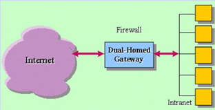 Primer zaštitnog zida poznatijeg kao među-sistemski prolaz.